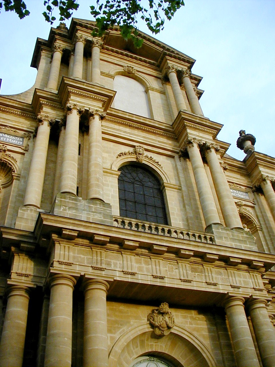 Metz - Eglise Saint-Vincent - Façade